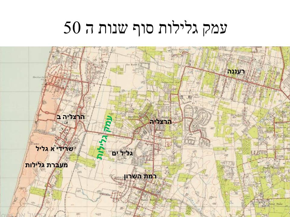 עמק גלילות שנות ה 50 של המאה העשרים